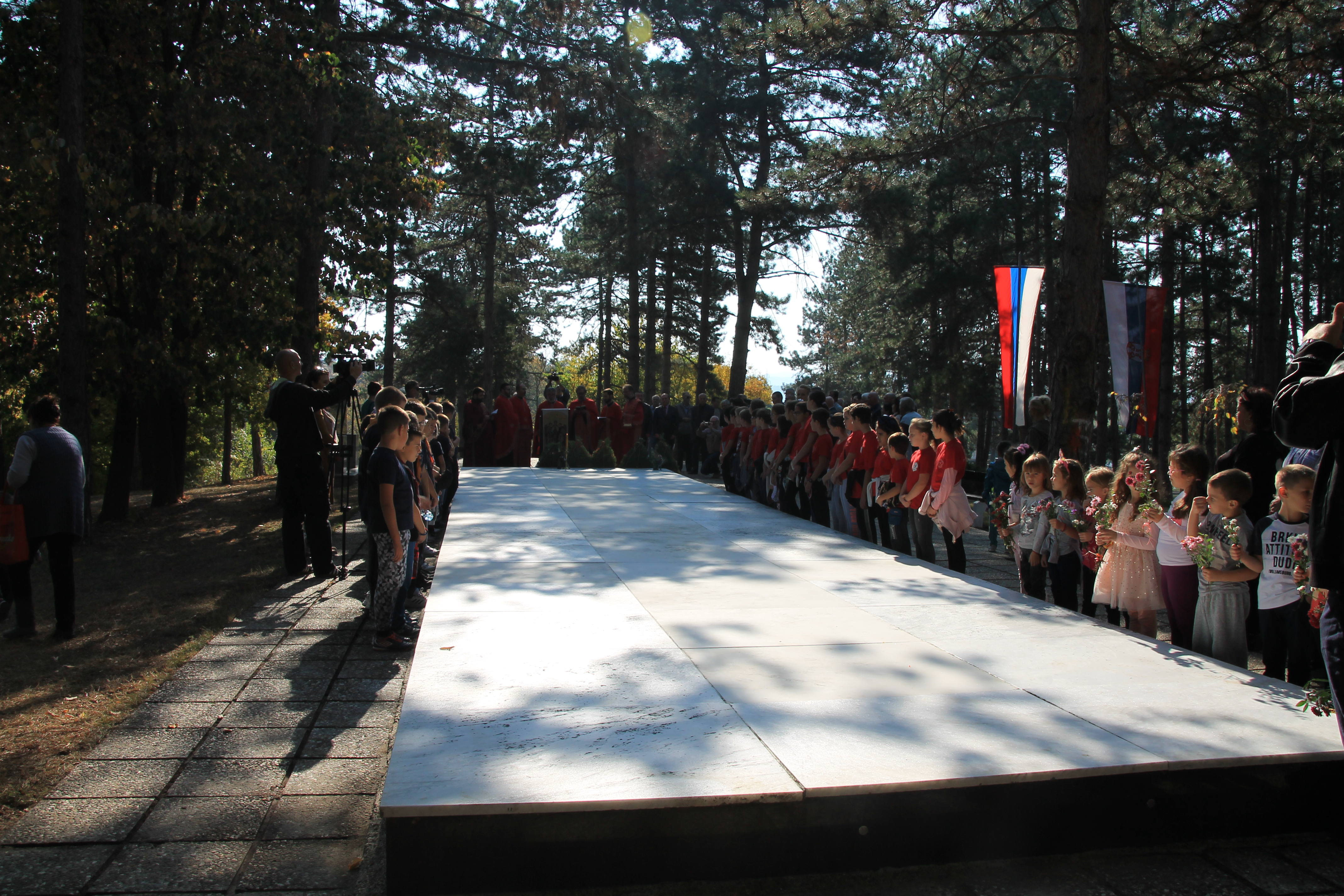 Spomen–kosturnica boraca Crvene armije